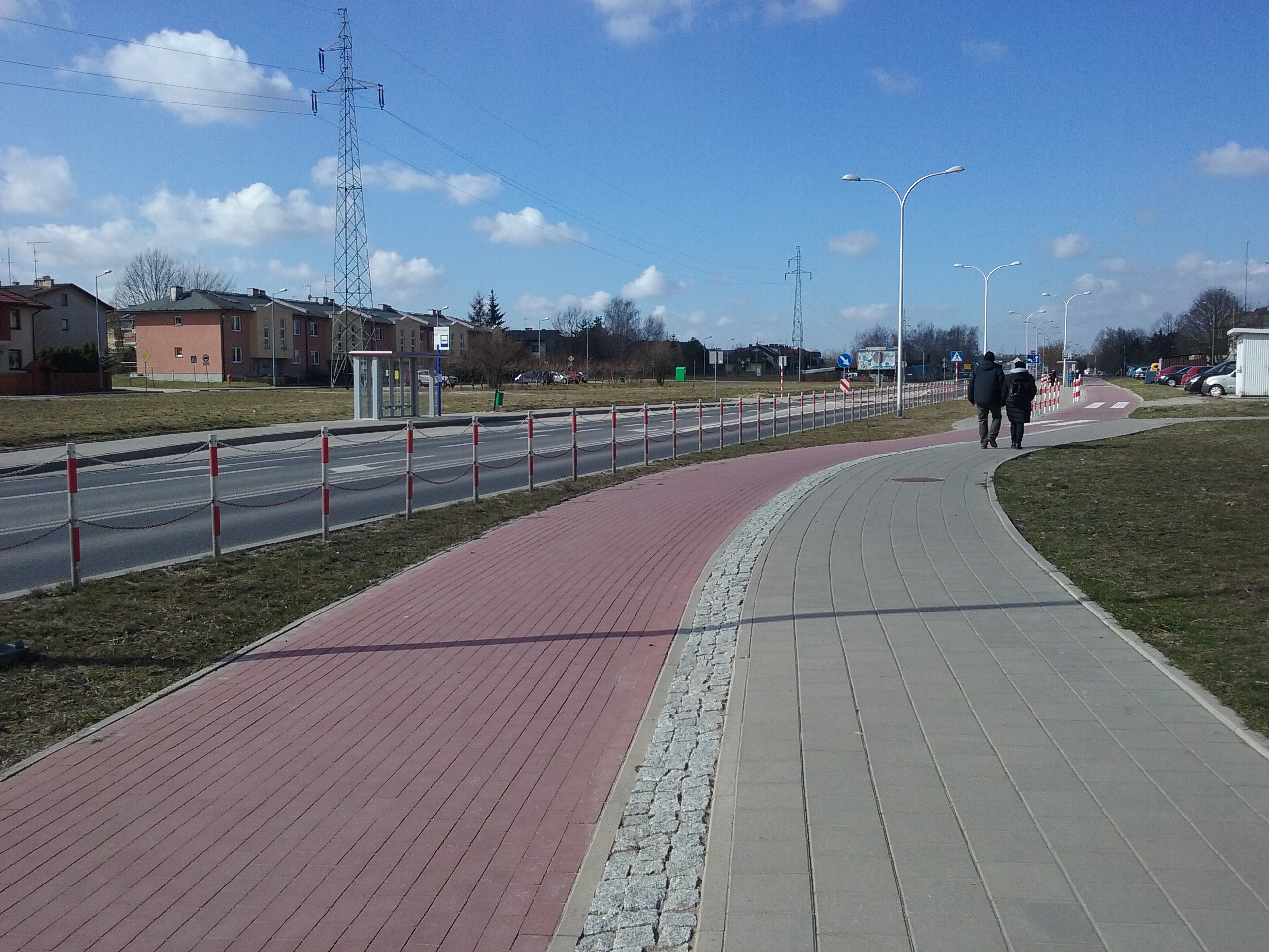 Tomaszów Mazowiecki, ścieżka rowerowa wzdłuż ulicy Wandy Panfil.